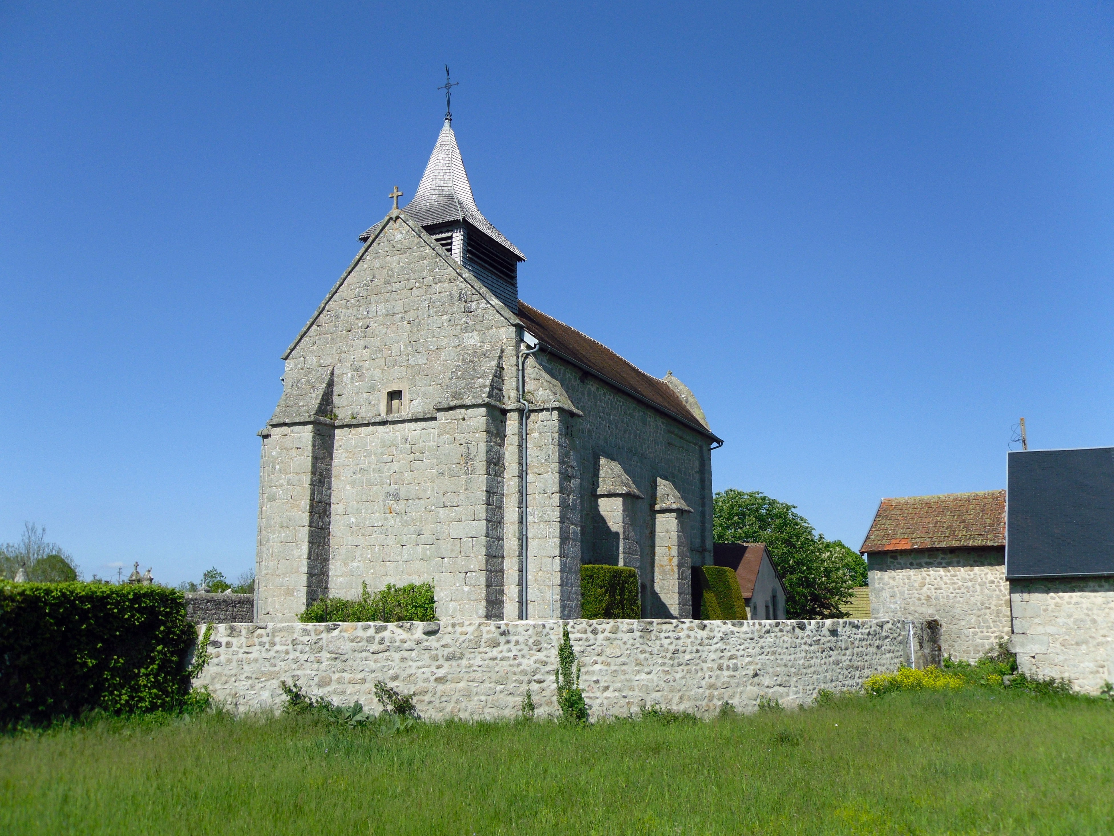 Eglise